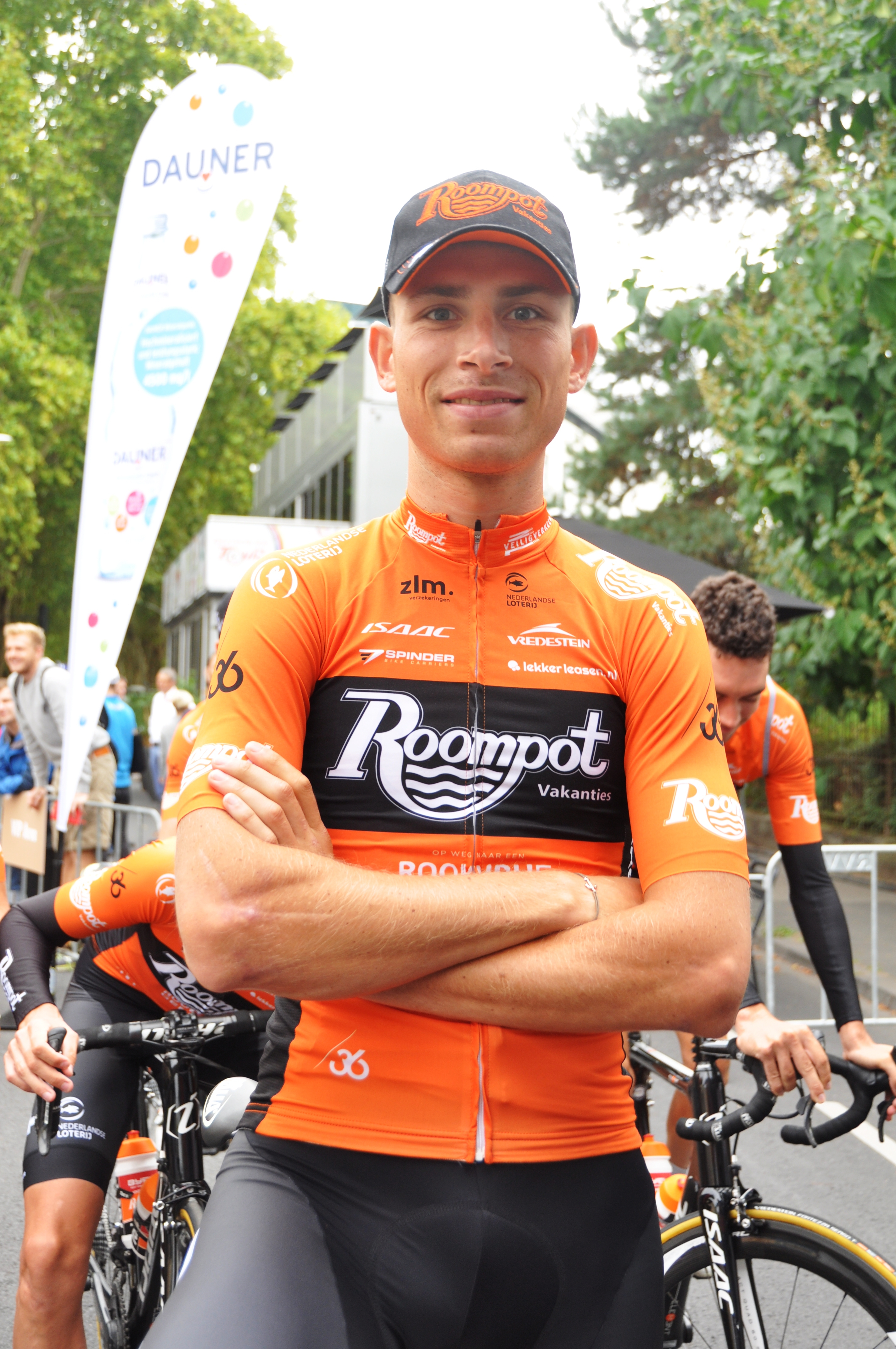 Martijn Budding, niederländischer Radrennfahrer - Beschreibung prüfen